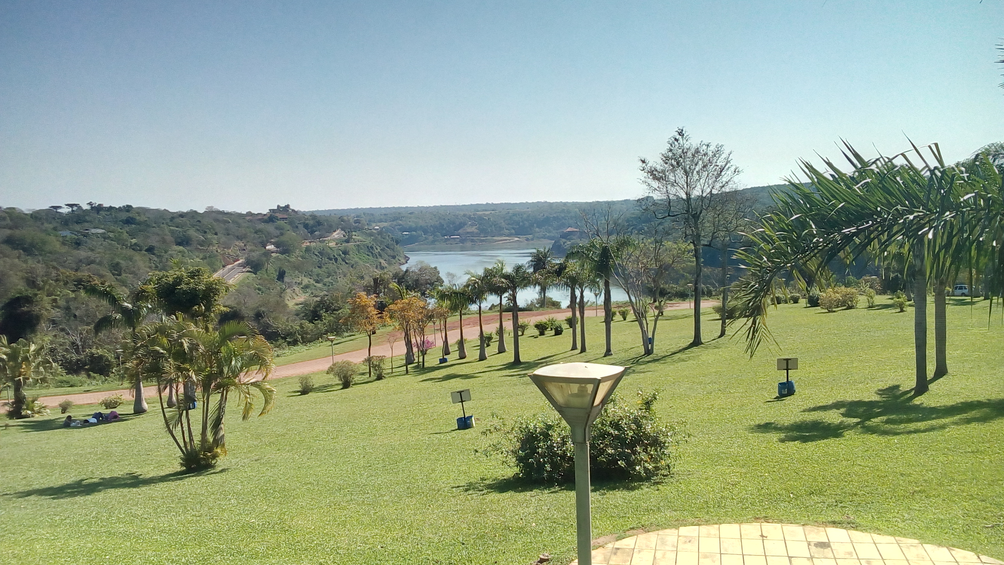 Parte final del curso del Rio Iguazu en su desembocadura (al fondo), del Rio Parana. Su nombre significa Agua Grande y fue puesto así, por los aborígenes Paisaje del Rio Iguazu